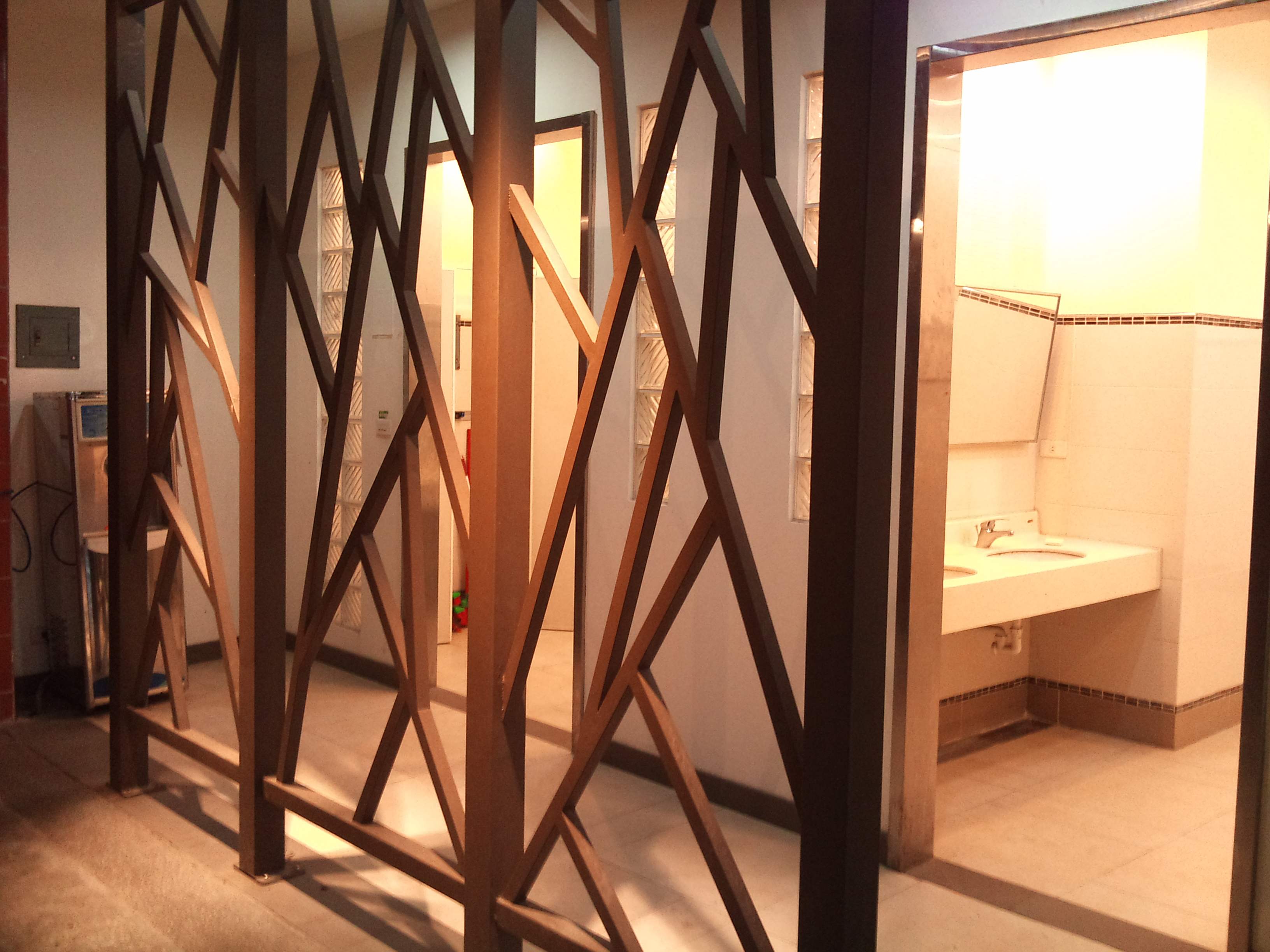 台南二中弘道大樓廁所-2樓教務處旁